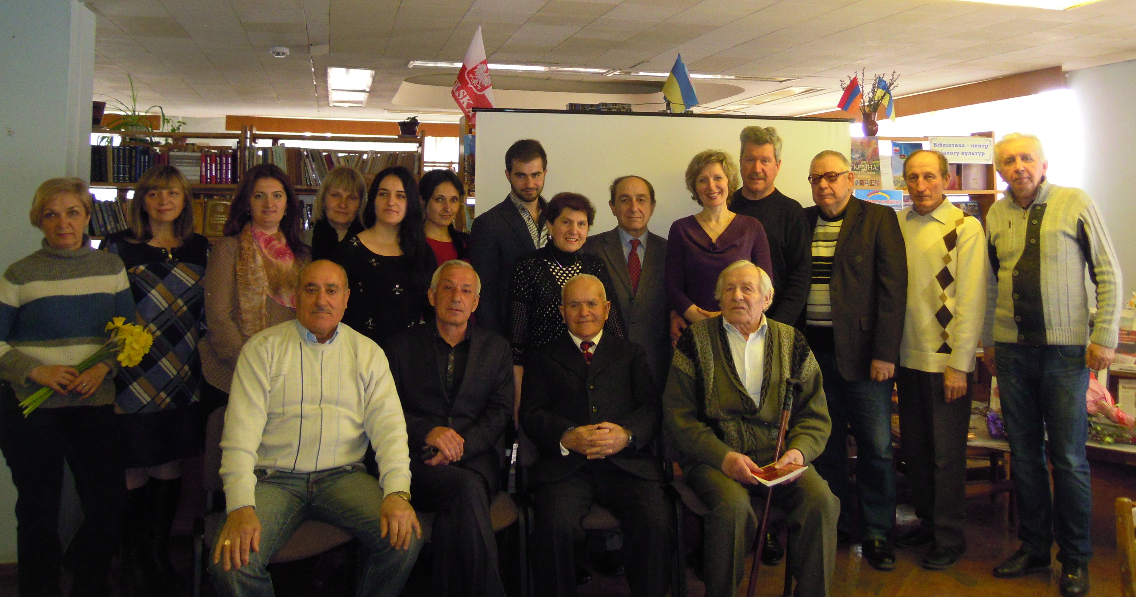 Вечір, присвячений 90-річчю від дня народження відомого журналіста, літератора, громадського діяча, педагога Вазгена Христофоровича Балаяна.